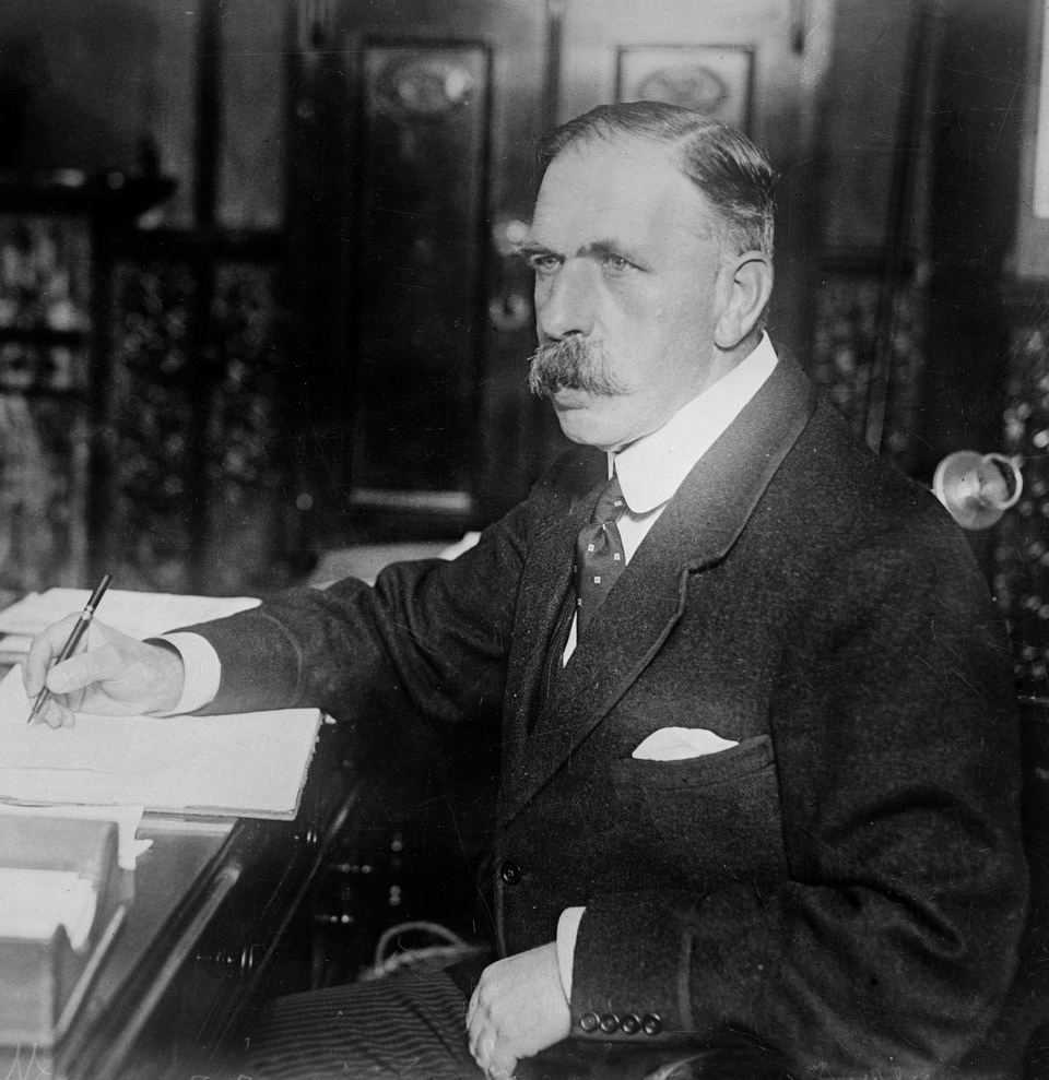 Le nouveau Lord maire de Londres Sir Horace Marshall : [photographie de presse] / [Agence Rol]